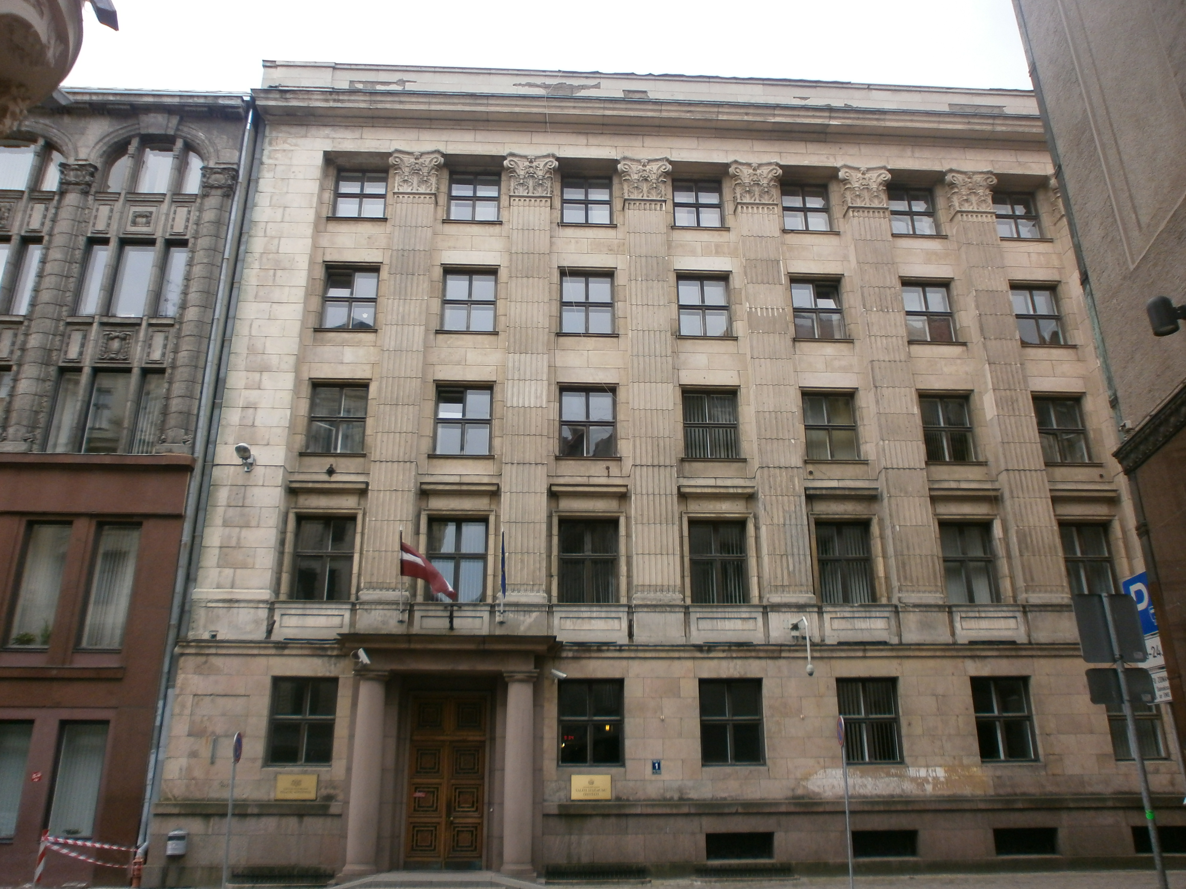 Valsts ieņēmumu dienests